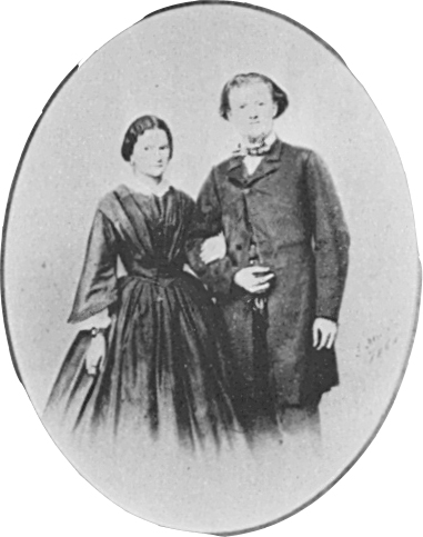 Paul Sinner und Wilhelmine Kienle als Hochzeitpaar (Albuminabzug)